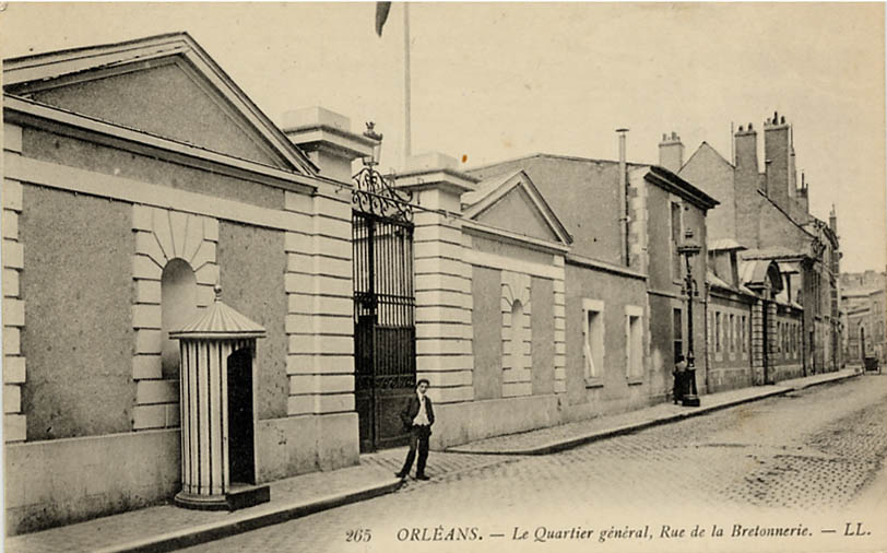 Hôtel Gombault Orléans vers 1900, quartier général du 5e Corps d'armée française